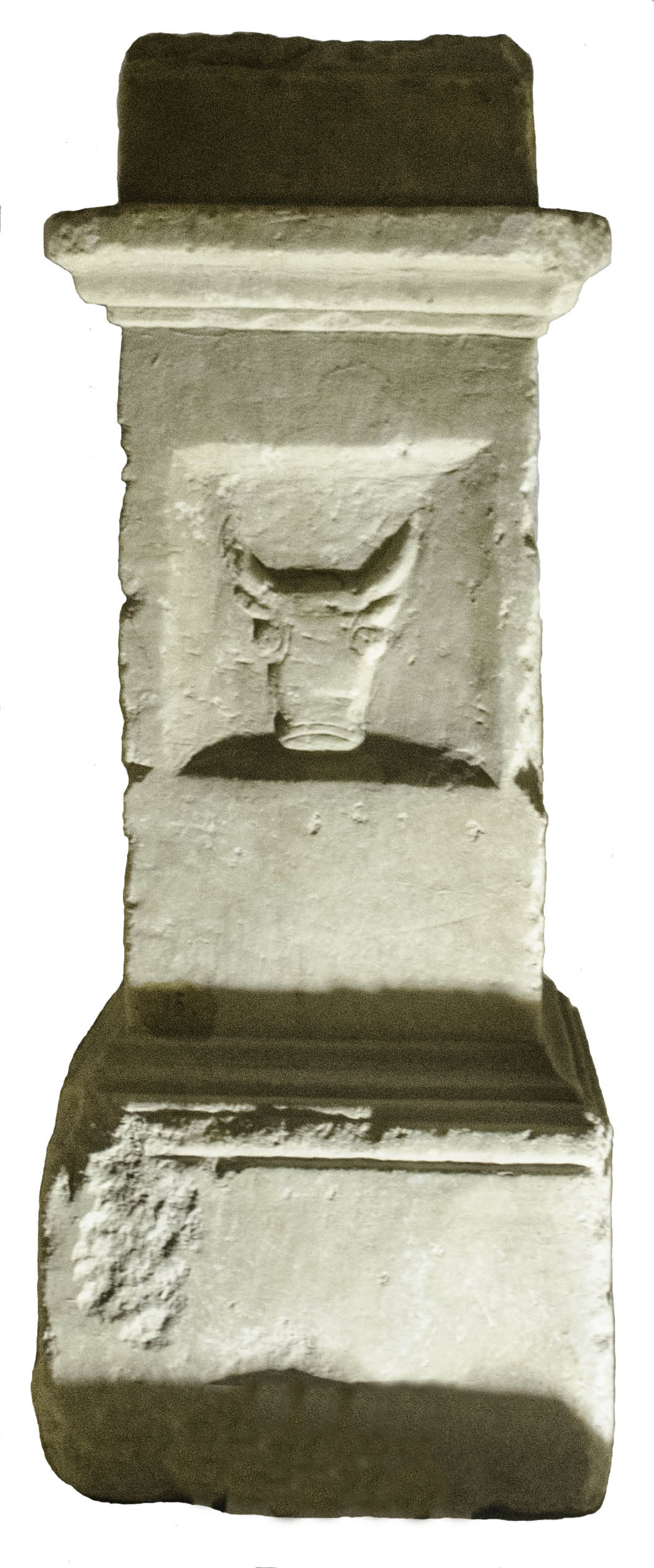 Autel taurobolique de Iulia et Hygia, face latérale gauche : tête de taureau. Musée Eugène-Camoreyt de Lectoure, Gers, France.